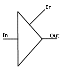 TriState Buffer